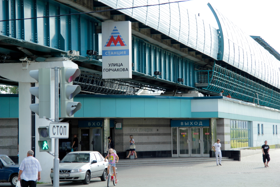 Moscow Metro (Московский метрополитен) Butovskaya Line of Light Metro (Бутовская линия лёгкого метро)